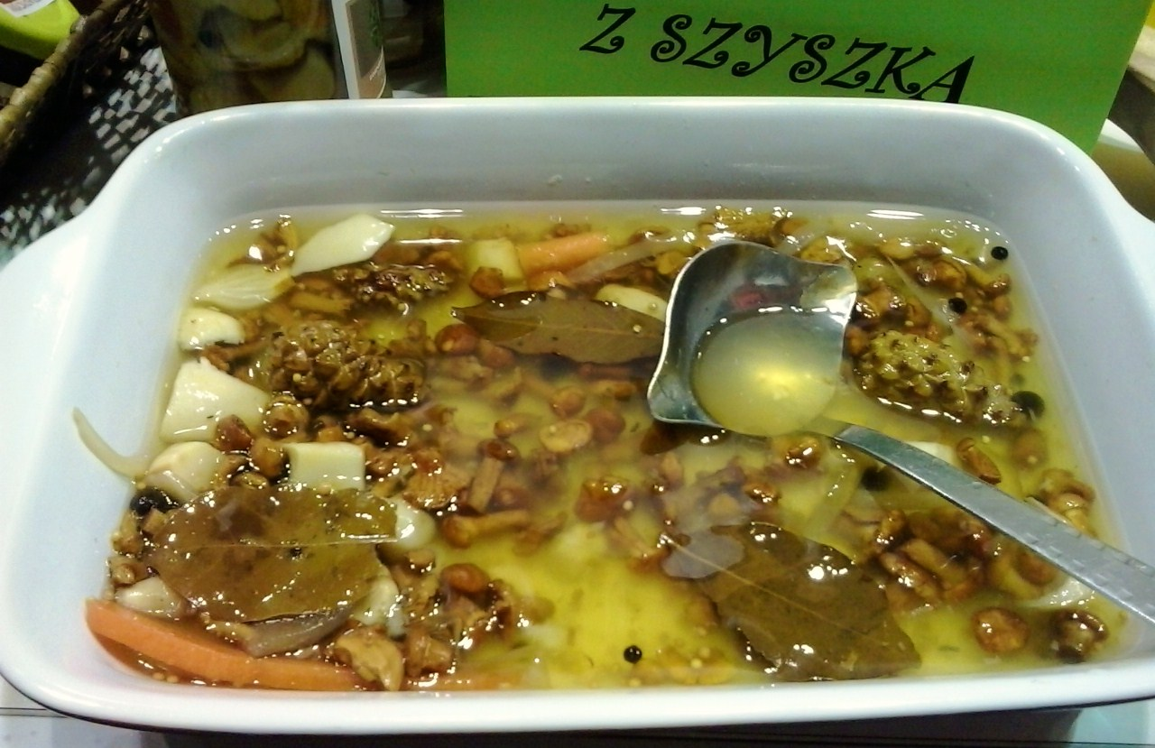 „Grzyby marynowane z szyszką”. Produkt wpisany 8 czerwca 2011 na Listę produktów tradycyjnych Ministerstwa Rolnictwa i Rozwoju Wsi w kategorii „Inne” w woj. zachodniopomorskim. Grzyby w zalewie z szyszką sosnową.